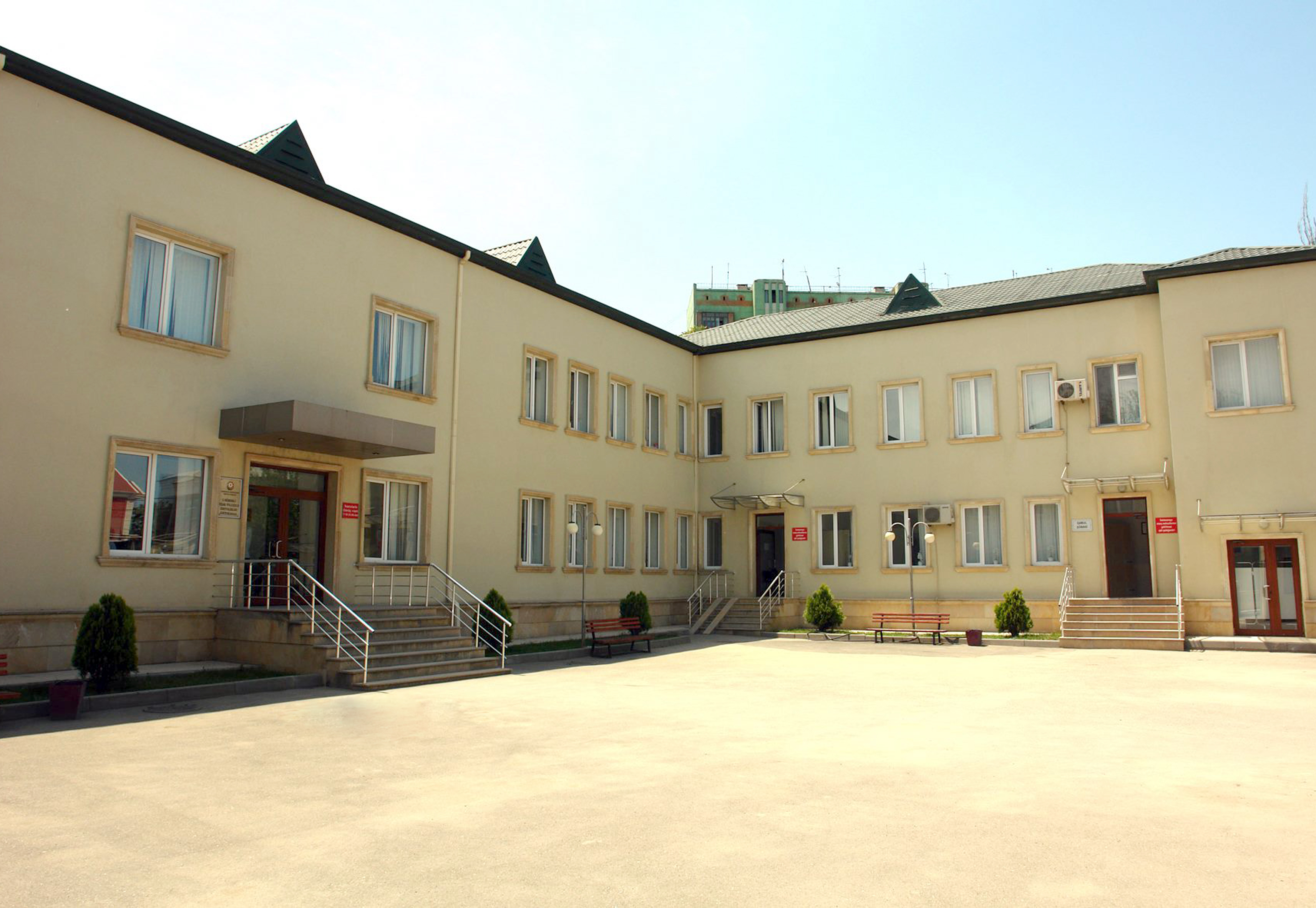 Bakıxanov (qəsəbə) 5 nömrəli uşaq yolxucu xəstəliklər xəstəxanası (1)